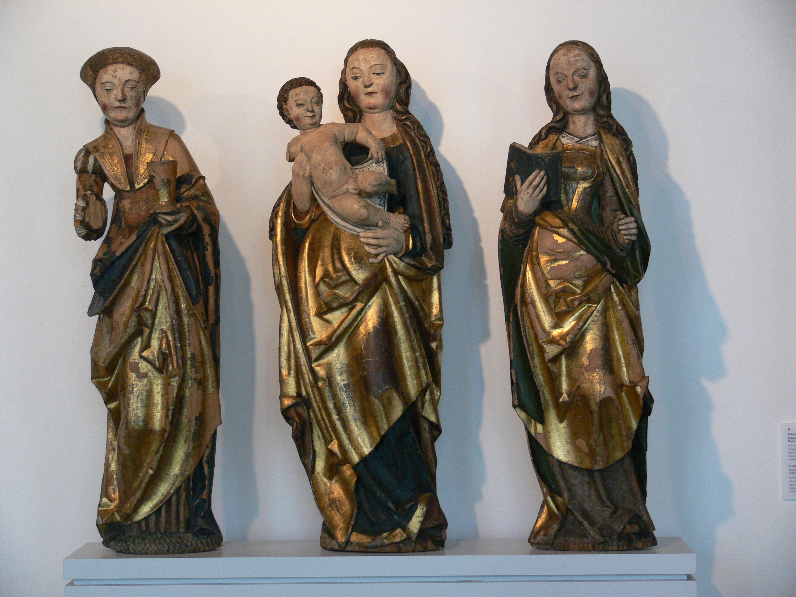 Markersbacher Retabel, um 1520, Lindenholz in originaler Fassung, aus Markersbach (Stadt Bad Gottleuba-Berggießhübel) Die drei erhaltenen Schreinfiguren des Retabels: Hl. Maria Magdalena, Maria mit Kind, Hl. Katharina von Alexandrien Staatliche Kunstsammlungen Dresden, Skulpturensammlung, SAV 2107–2113 (ausgestellt im Schloßbergmuseum Chemnitz)